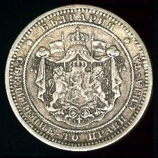 Bulgarian Coin 2 Leva 1882 Reverse.